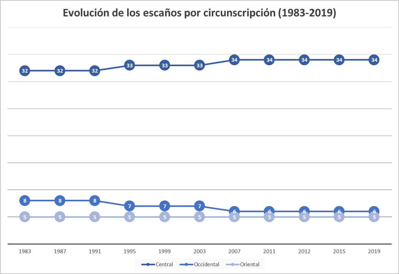 ES* Evolución de los escaños por circunscripción del Parlamento Asturiano desde 1983 hasta 2019 por año electoral. AST* Evolución de los escaños por circunscripción del Parlamentu Asturianu dende 1983 hasta 2019 per añu electoral.